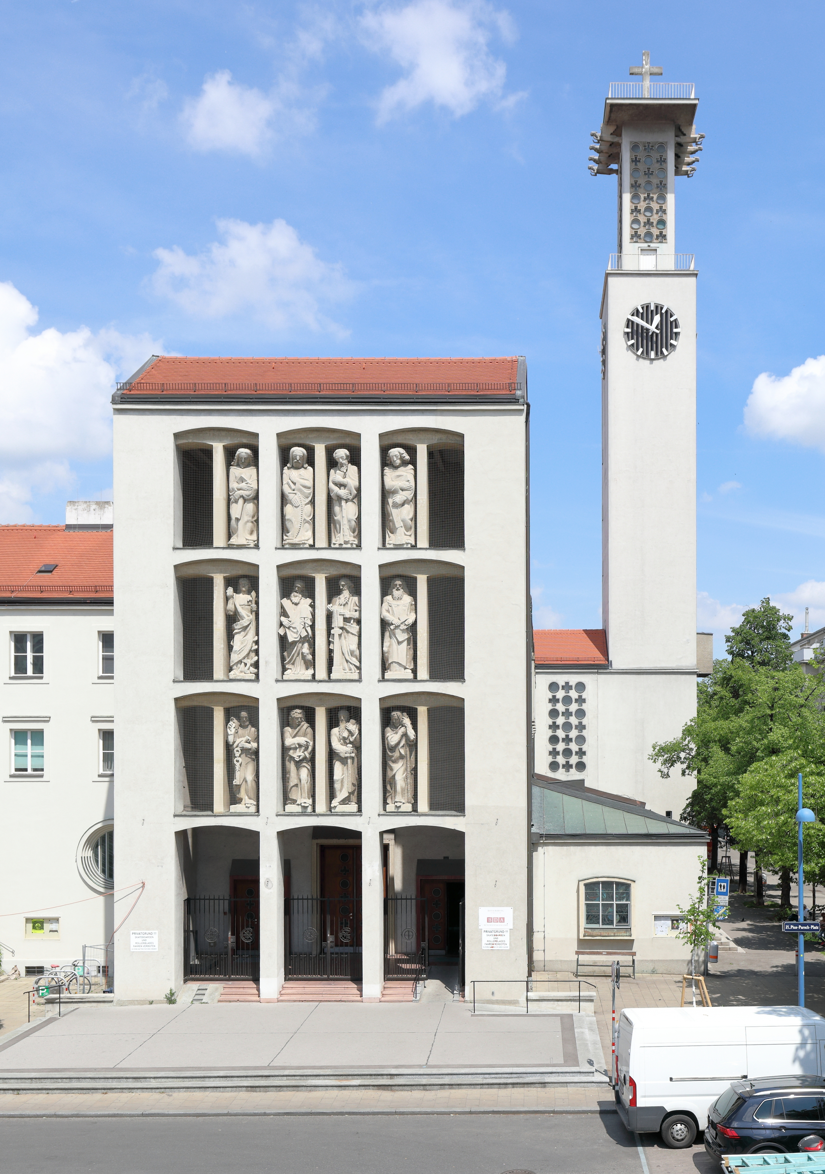 Die römisch-katholische Pfarrkirche hl. Josef in Floridsdorf, ein Stadtteil der österreichischen Bundeshauptstadt Wien.Die Kirche wurde nach den Plänen des Architekten Robert Kramreiter in den Jahren von 1936 bis 1938 errichtet. Die je vier Apostel-Sandsteinfiguren in drei Stockwerken stammen von den Bildhauern Robert Ullmann, Franz Zorn und Franz Santifaller (Jakobus d. J., Simon, Judas Thaddäus und Thomas).